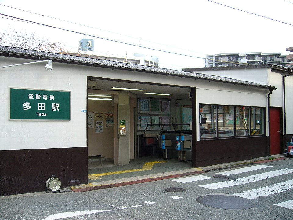 能勢電鉄多田駅